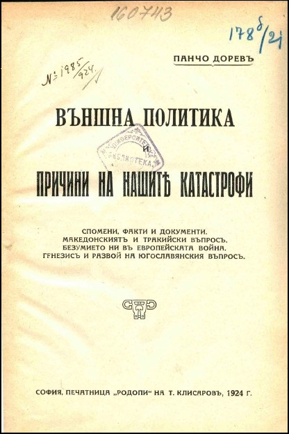 Корица на книгата на Панчо Дорев от с. Пътеле, Леринско, Егейска Македония - "Външна политика и причини на нашите катастрофи. Спомени, факти и документи. Македонският и Тракийският въпрос. Безумието ни в Европейската война. Генезис и развой на Югославянския въпрос", София, 1924 година